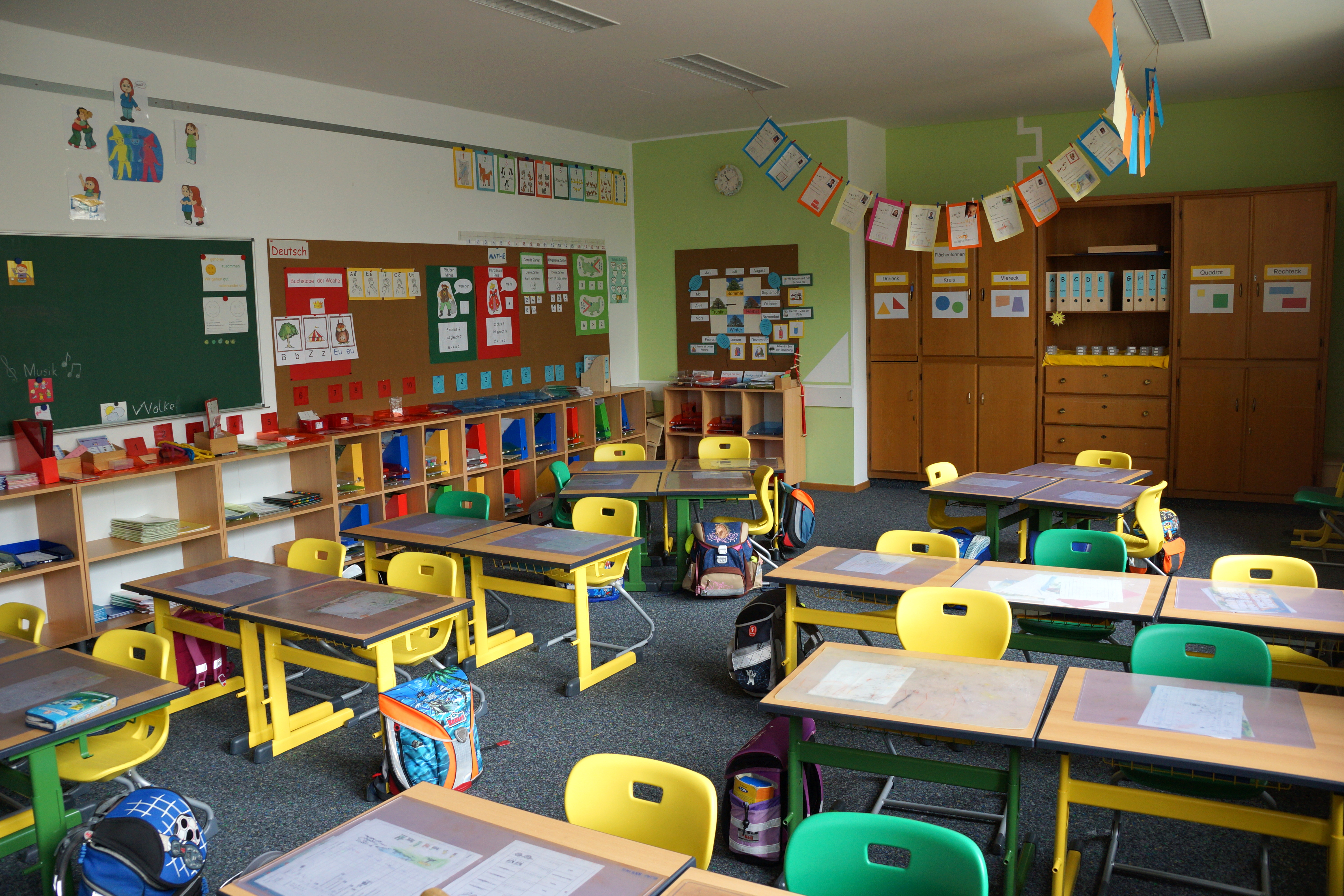 Schulräume/Klassenzimmer der privaten katholischen Grundschule im Haus St. Marien in Neumarkt in der Oberpfalz